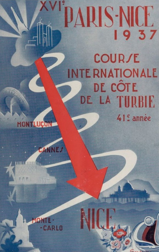 Affiche du Critérium Paris-Nice 1937 (16e édition).